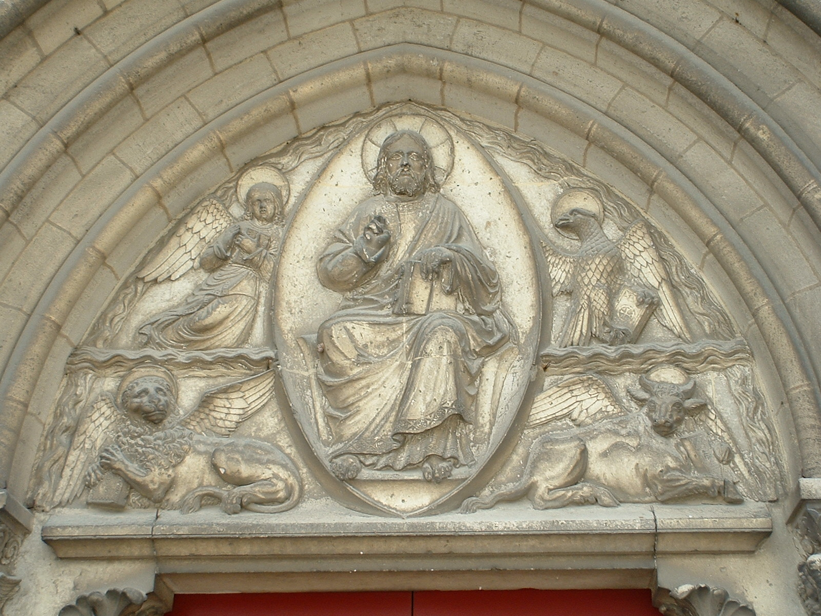 Église Saint-Jacques de Pirmil (Nantes, France) - tympan au-dessus de la porte, symbolisant les auteurs des évangiles. Object location47° 11′ 47.4″ N, 1° 32′ 17.56″ W